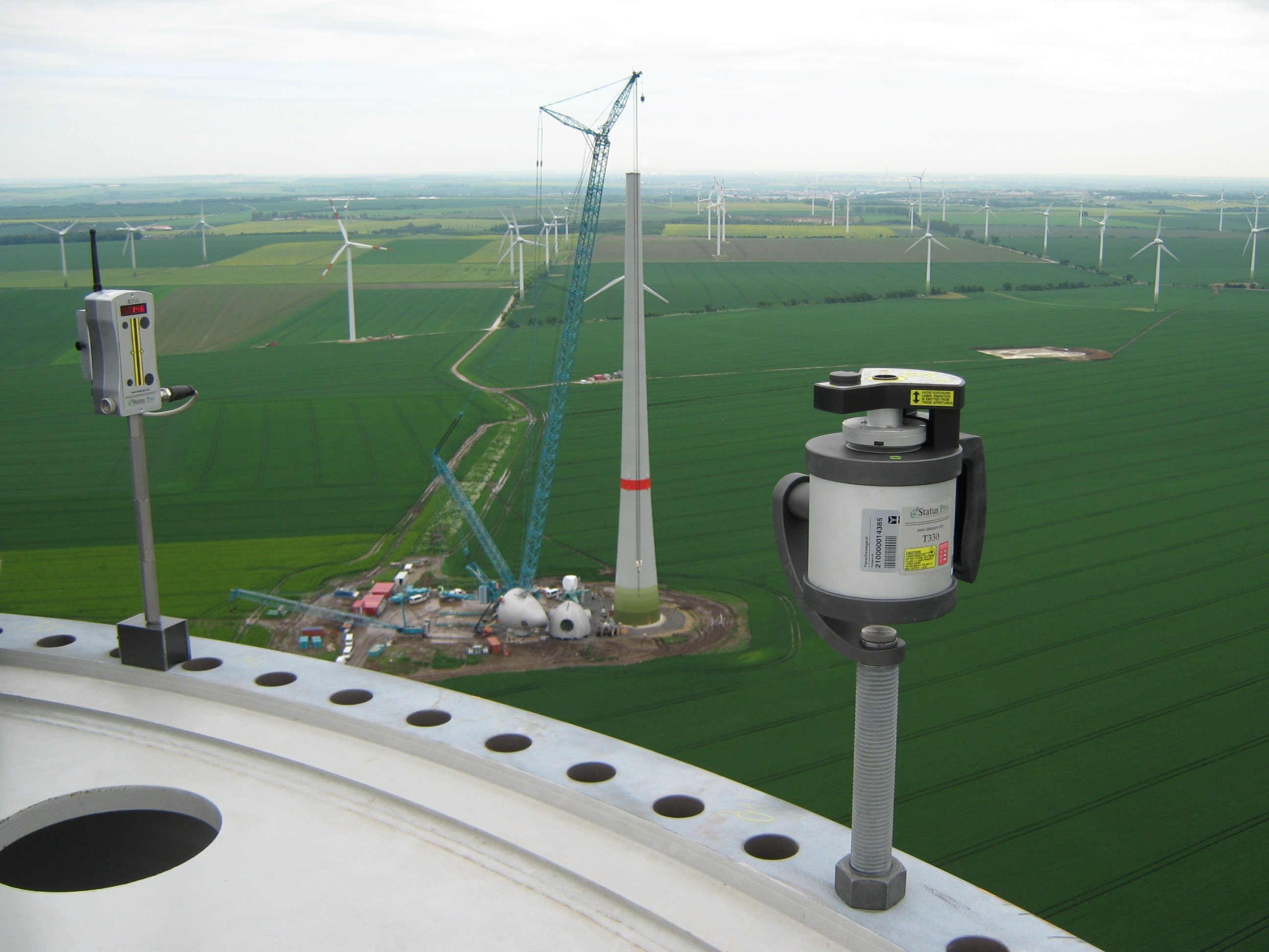 Vermessung der Flanschebenheit eines Windkraftturmes mit Rotationslaser und Empfänger